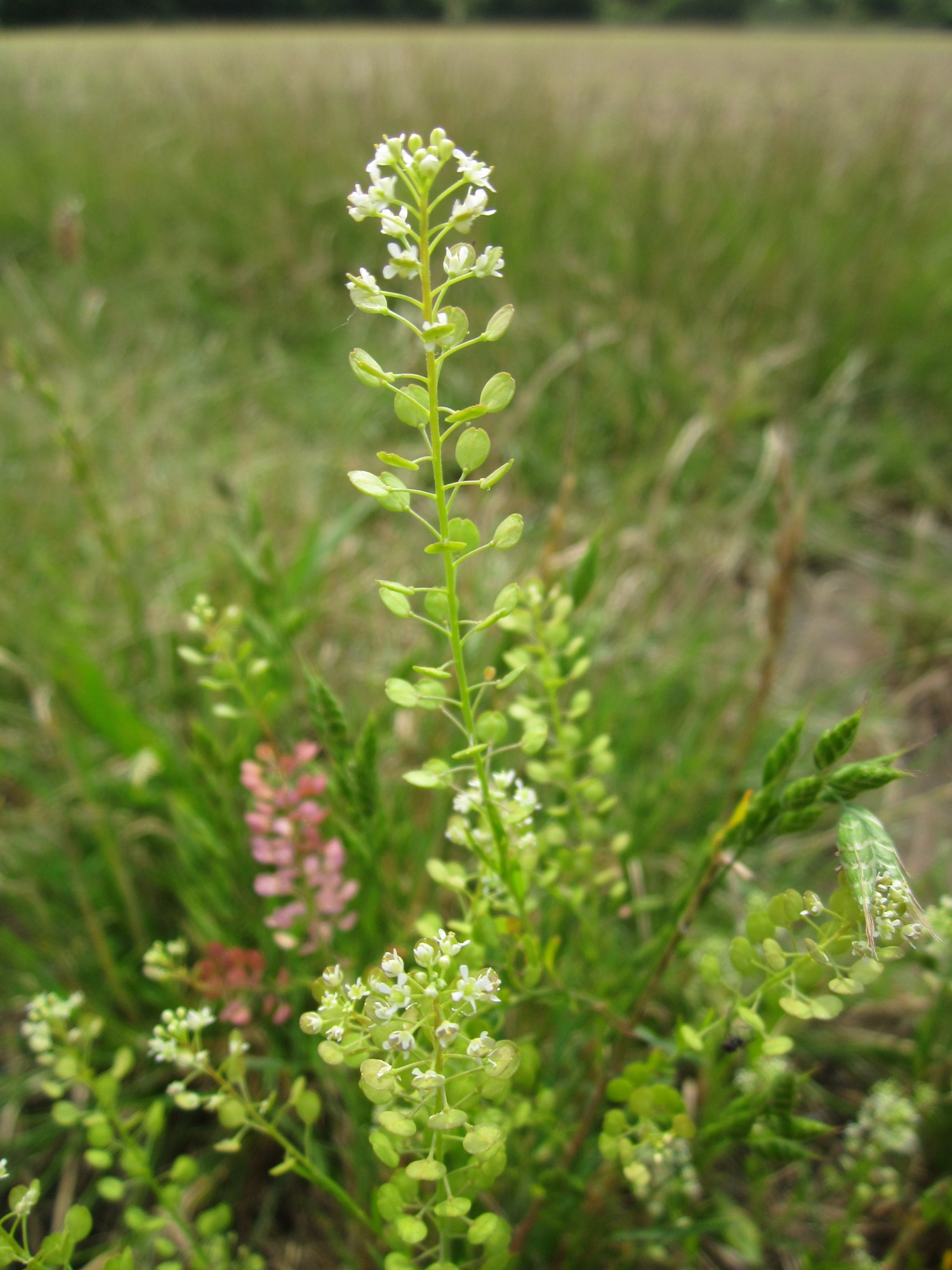 Virginische Kresse (Lepidium virginicum) bei Reilingen